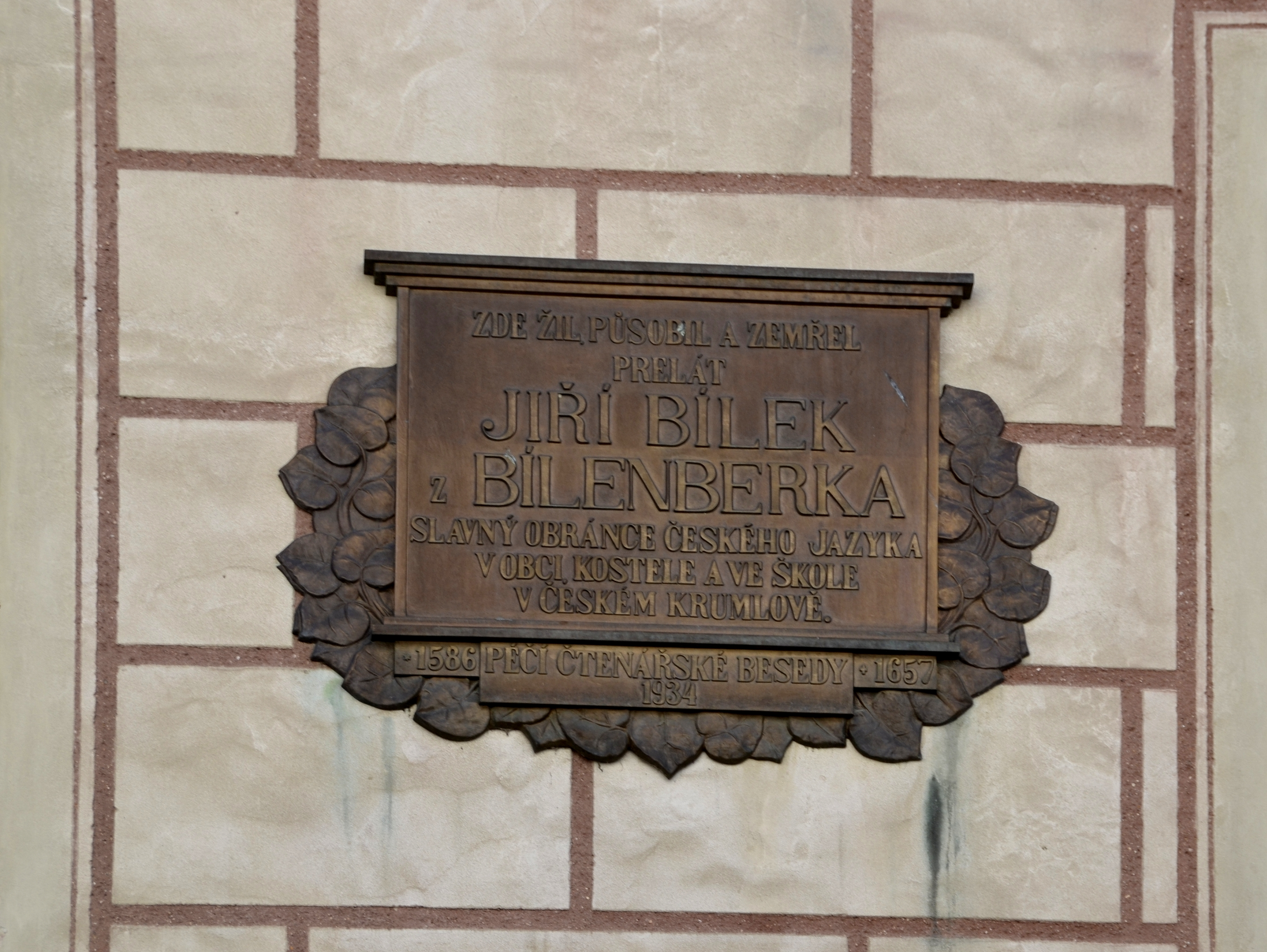 Pamětní deska (Jiřího Bíleka z Bilenberku) v Českém Krumlově na budově prelatury, Horní č. p. 155. Původní desku odhalila krumlovská česká menšina v roce 1934, 1938 byla odstraněna. Znovu obnovena byla v roce 1997.